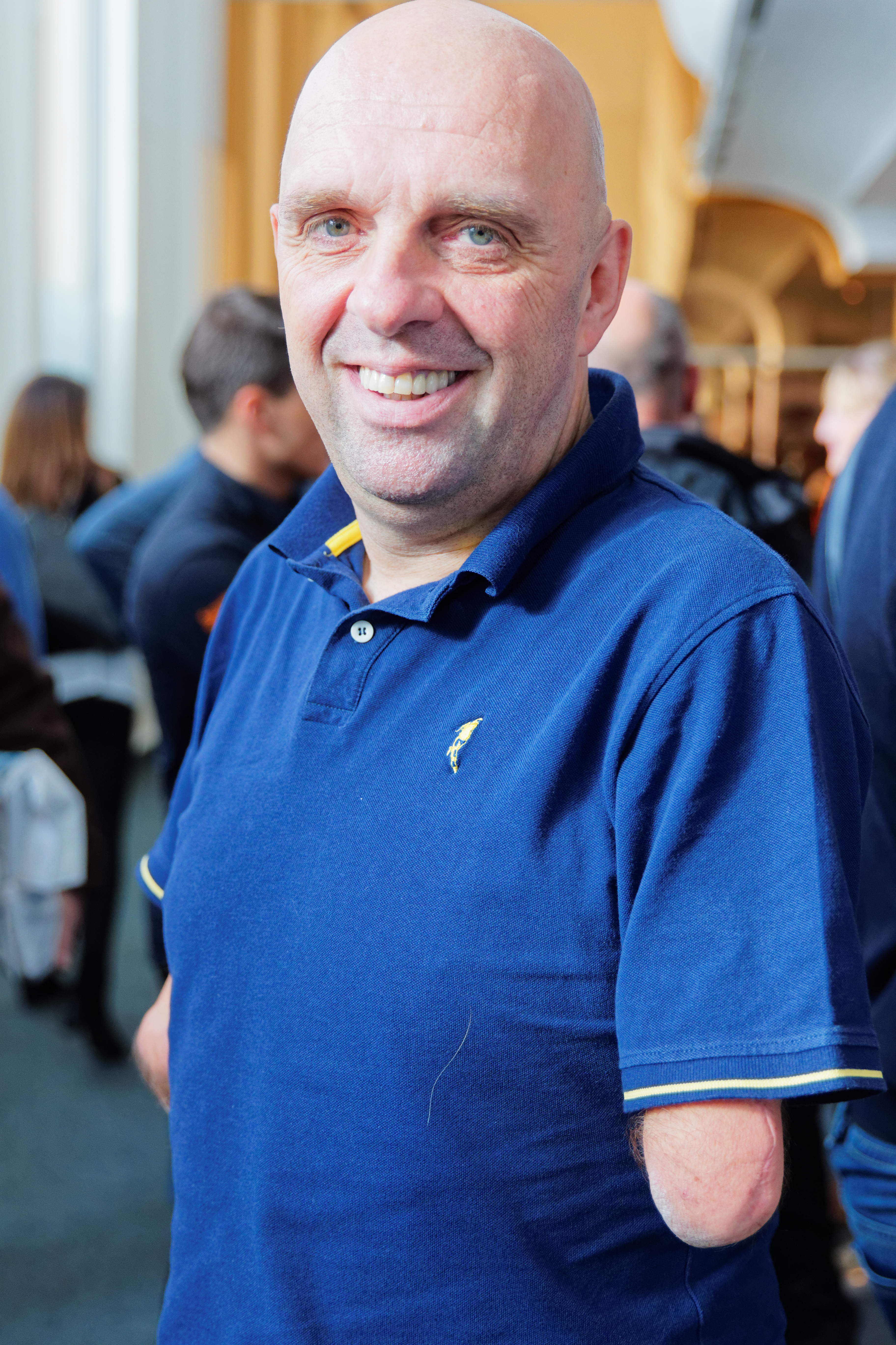 Conférence de presse du Dakar 2016.